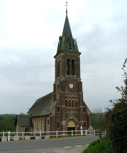 Église de Cheffreville